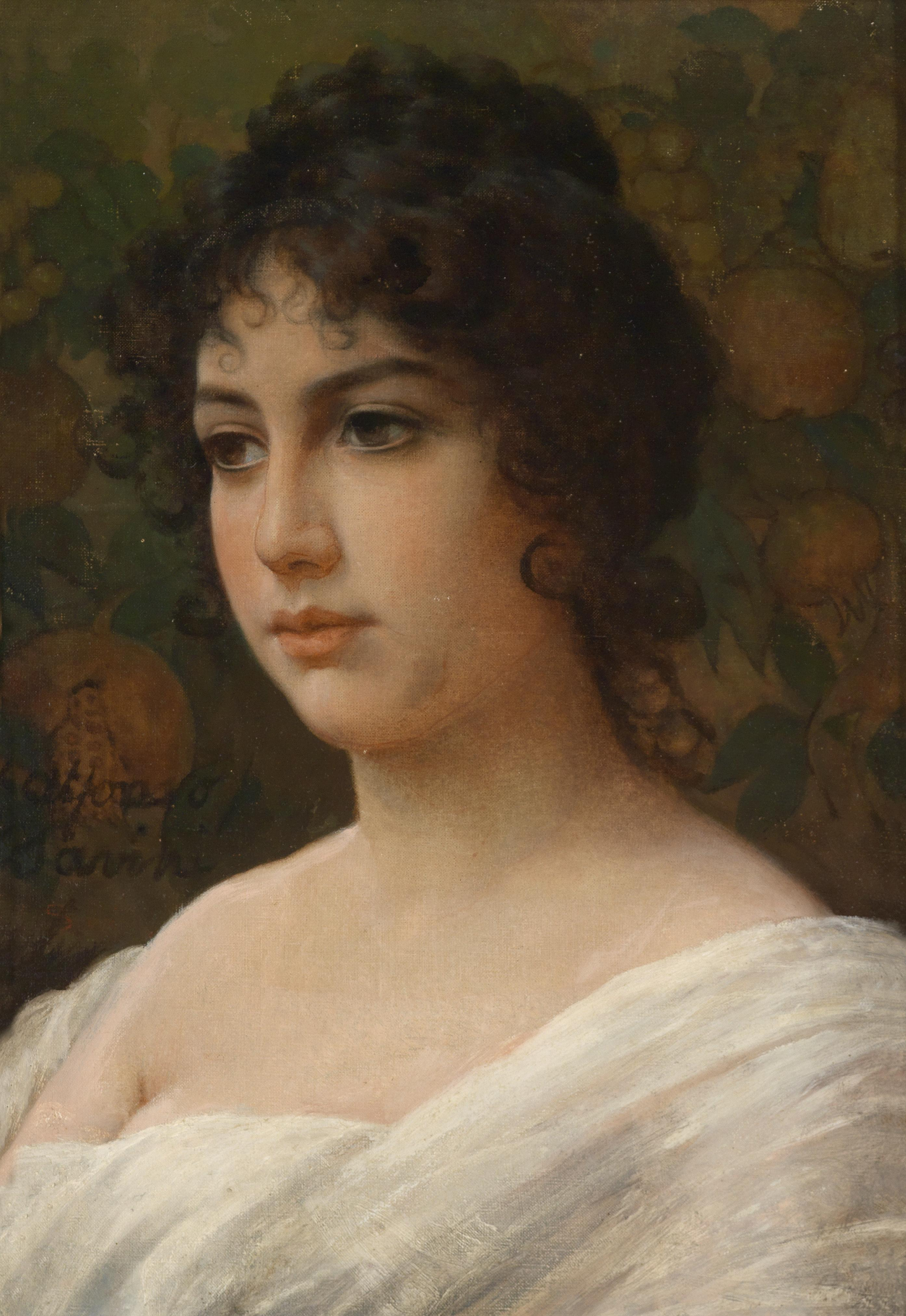 Mädchenportrait